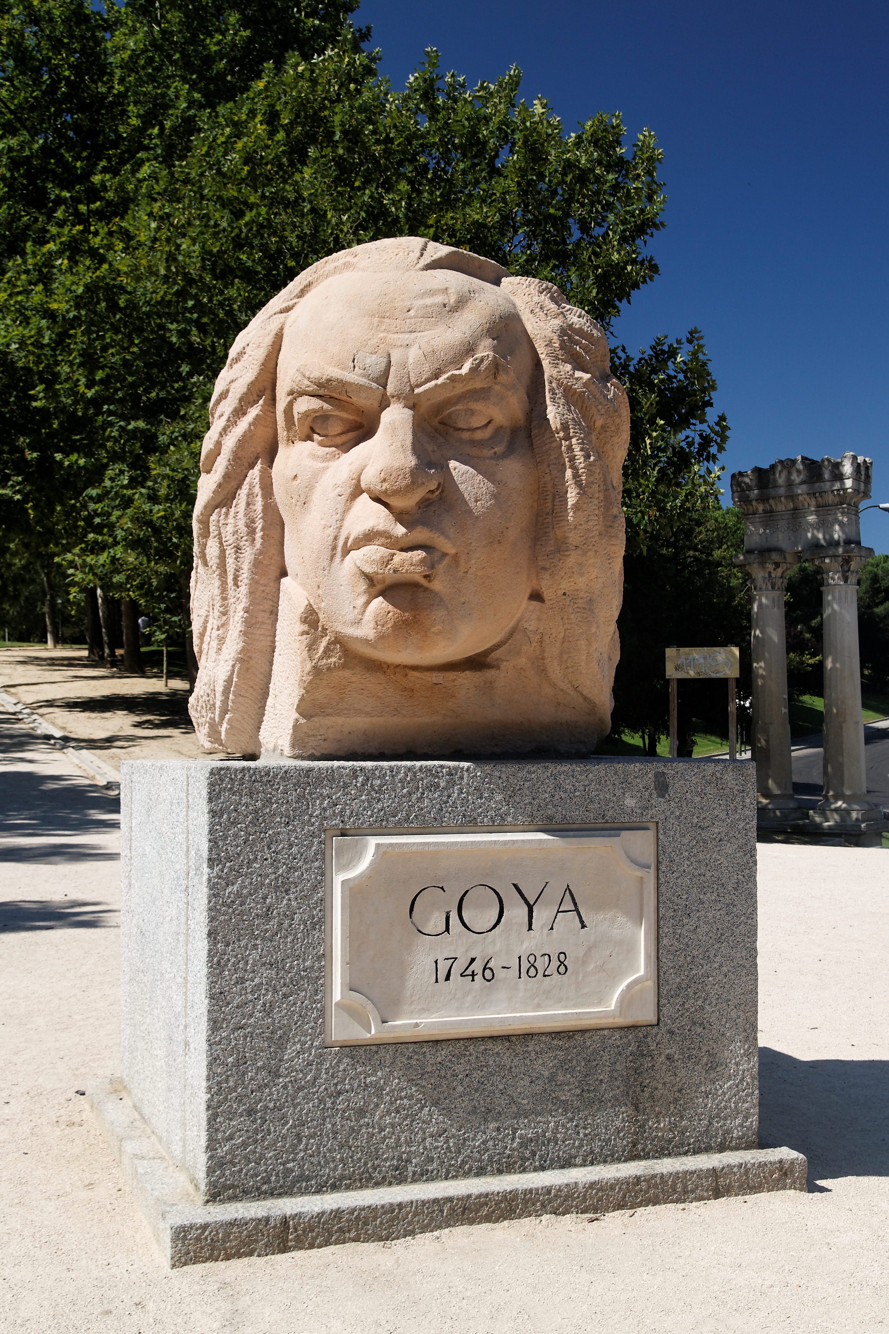 Busto de Francisco de Goya en el Parque de San Isidro, Madrid, España. Obra de Juan Cristóbal González (1932)